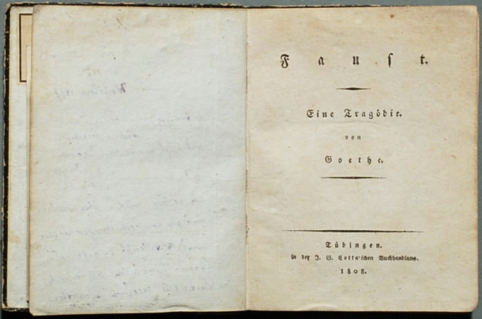 Johann Wolfgang von Goethe (1749–1832) Alternative namesJohann Wolfgang Von Goethe; Goethe; goethe; johann wolfgang von goethe; joh. wolfg. von goethe; j. w. von goetheDescriptionGerman poetDate of birth/death28 August 174922 March 1832Location of birth/deathFrankfurt, GermanyWeimar, GermanyAuthority control : Q5879 VIAF: 24602065 ISNI: 0000 0001 2099 9104 ULAN: 500014761 LCCN: n79003362 NLA: 35129828 WorldCat Faust. Eine Tragödie. 1808. 309 Seiten, Hagen 310 D1 Erstausgabe (Erstdruck).Vorderdeckel 12,8 x 9,8 cm. Erste rechtmäßige Ausgabe des vollendeten ersten Teils mit allen Merkmalen nach Hagen. Provenienz-Exemplar: Auf vorderem Vorsatz rechts oben Namenszug des Erstbesitzers J. Jacob Kollen. Darunter Namenszug des Germanisten Rudolf von Raumer, dat. 1877. Darunter der Eintrag "Weisstein 1877", gefolgt von einem Gedicht in acht Knittelversen, datiert Tbg. 15/7 77. Auf dem vorderen Spiegel links oben Papierschildchen: "Bibliothek Gotthilf Weisstein Berlin". Darunter ein gefalteter Karton angeklebt mit einem alten Katalogauszug von 1905 und handschriftlichen Vermerken. Anschließende Provenienz: Sammlung Adam, Auktion Dr. Tenner Heidelberg, 03. November 1981, Katalog-Nr. 501, Abbildung auf Tafel XVI. Eine weitere Abbildung von Titelblatt und Blatt mit den acht Versen enthält: Seele, Heide: Alte Bücher, Battenberg Sammler Kataloge München 1982, S. 156.